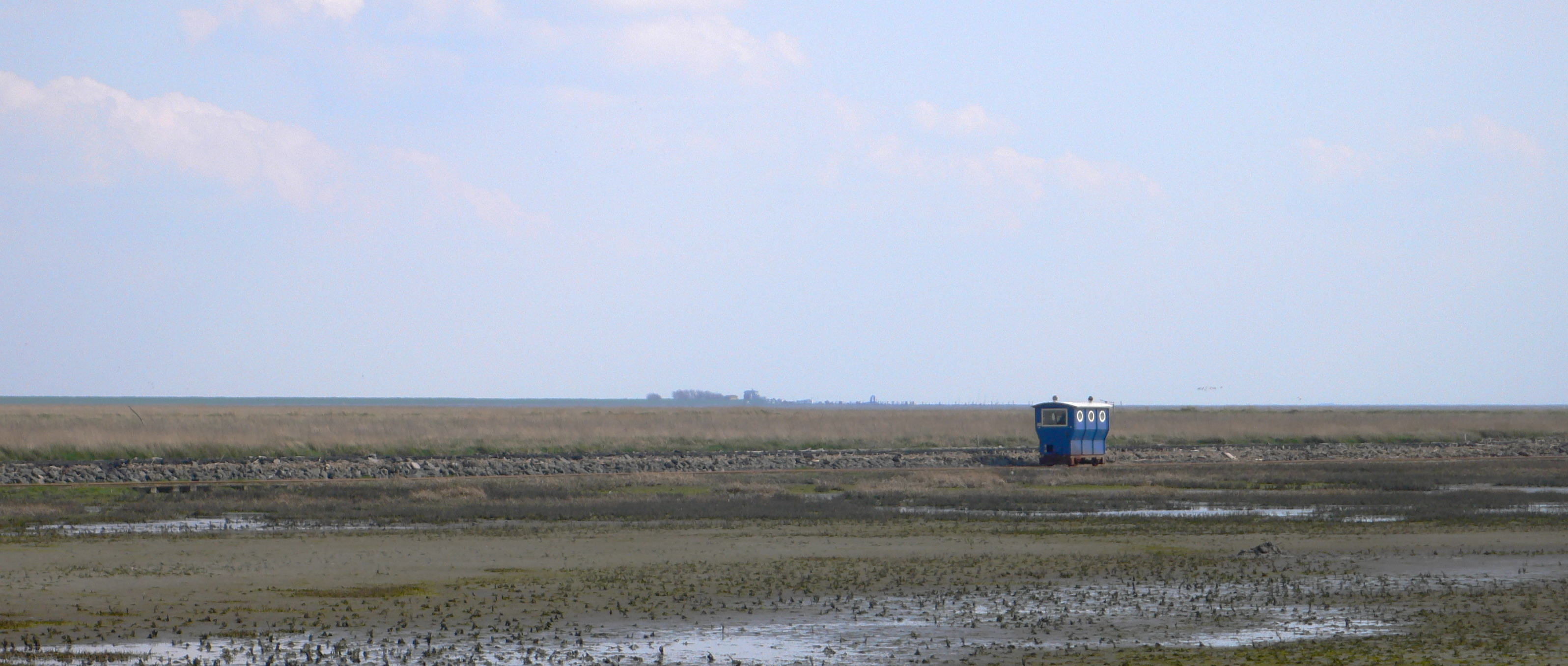 Eine Schmalspur-Lorenbahn auf dem Weg zur Hallig Oland